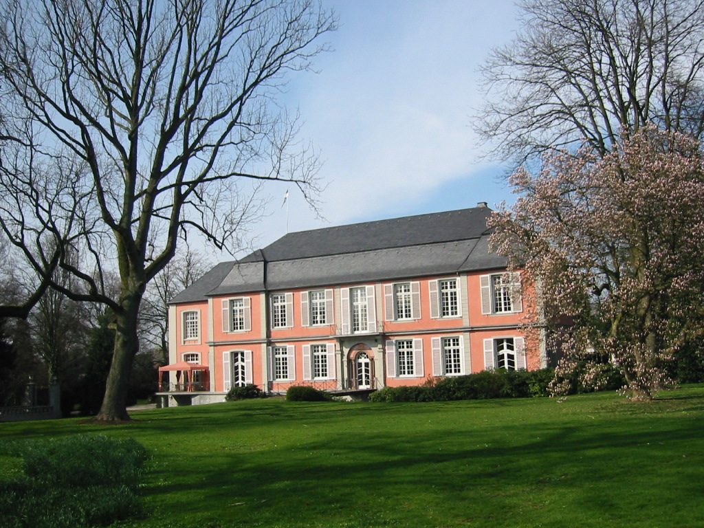 Herrenhaus des Schlosses Rurich in Hückelhoven-Rurich